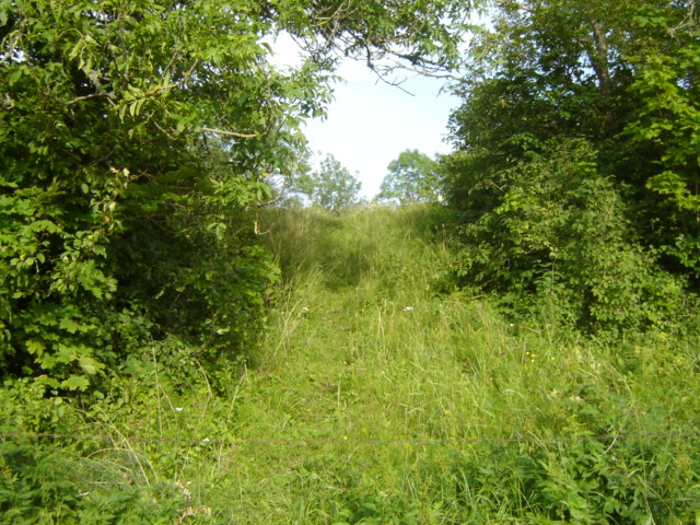 Linnuse vall